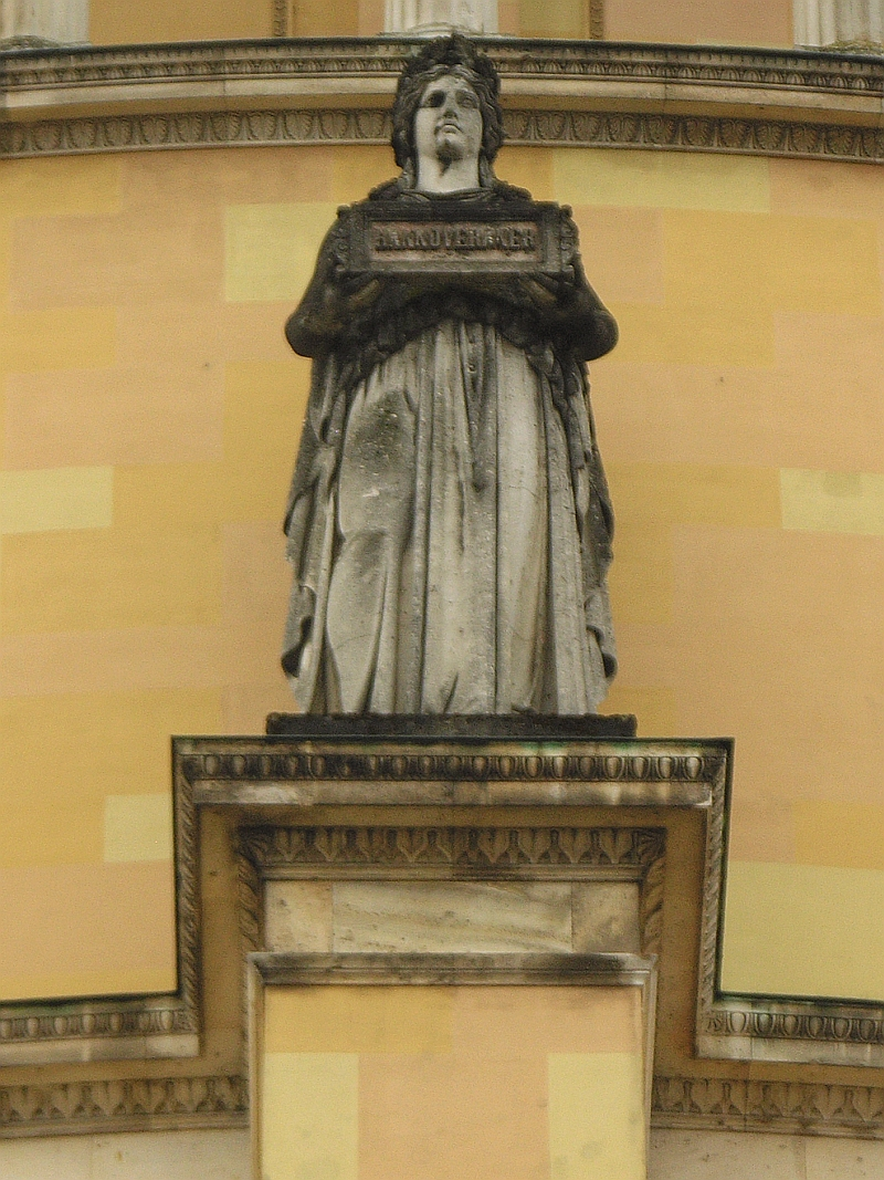 Diese Statue an der Aussenseite der Befreiungshalle in Kelheim steht für den Volksstamm der Hannoveraner, Höhe der Statue 580 cm. Sie ist eine von 18 Statuen, die nach Modellen des Bildhauers Johann Halbig geschaffen wurden.